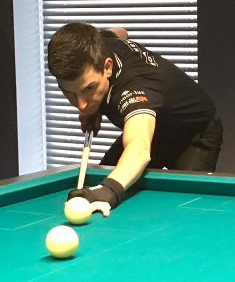 Raymund Swertz